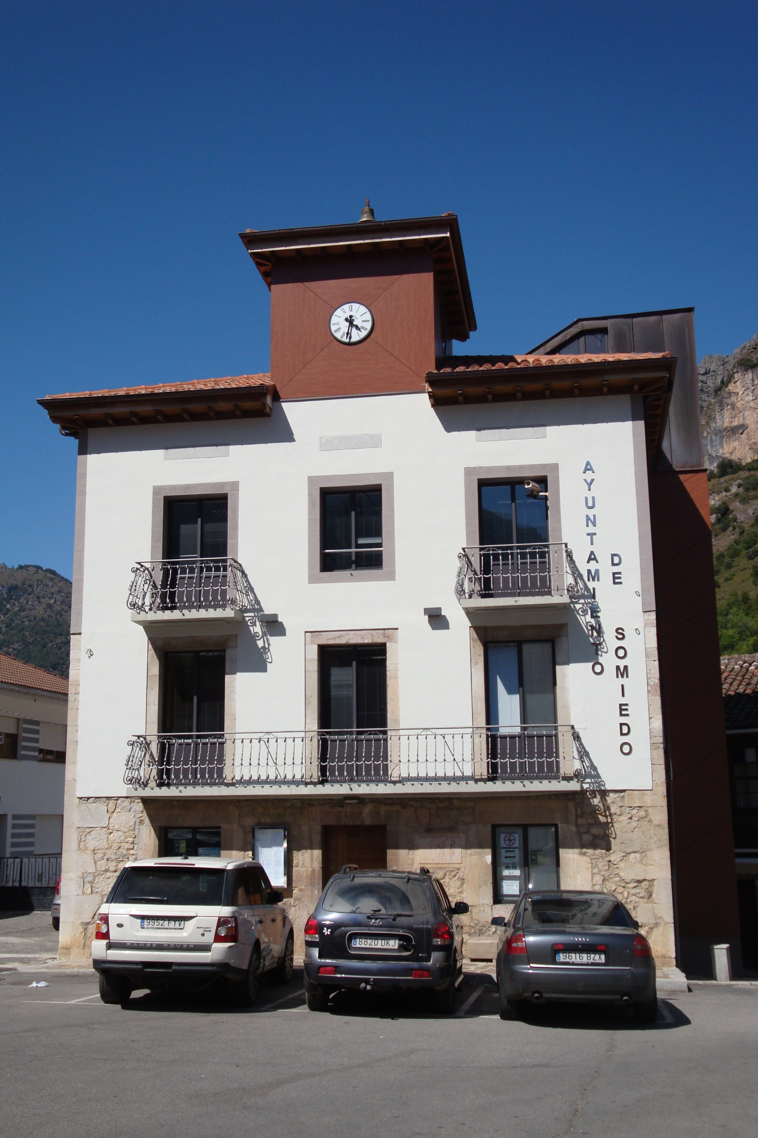 Casa Conceyu de Somiéu en 2013